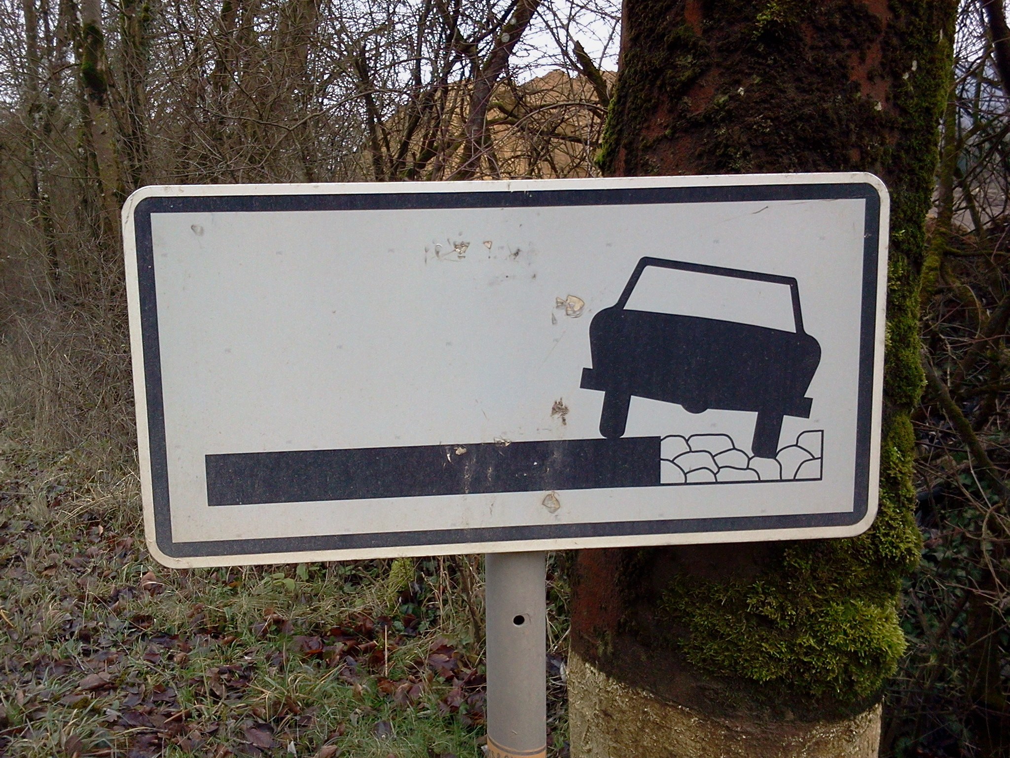 Verkéiersschëld F,16 "Summerwee kann net befuer ginn" aus dem lëtzebuerger Code de la Route.